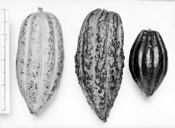 Negatief. Drie verschillende cacaokolven (djatirunggo hybride)